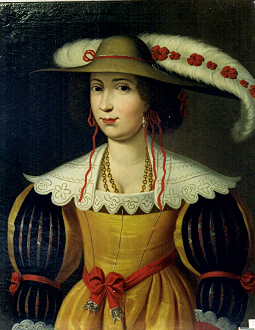 GesamtansichtBrustbild Anna v. Bentheim in gelbem Kostüm nach links, mit auffallendem Federhut, ähnlich wie der Ihres Mannes Christian I von Anhalt Bernburg. Moderner Duktus der Malerei Rückseite LW Mitte: Anna, Gräfin zu Bentheim, 2te Gemahlin F. Christ. I. geb. 1578. gest. 9.Xbr 1624